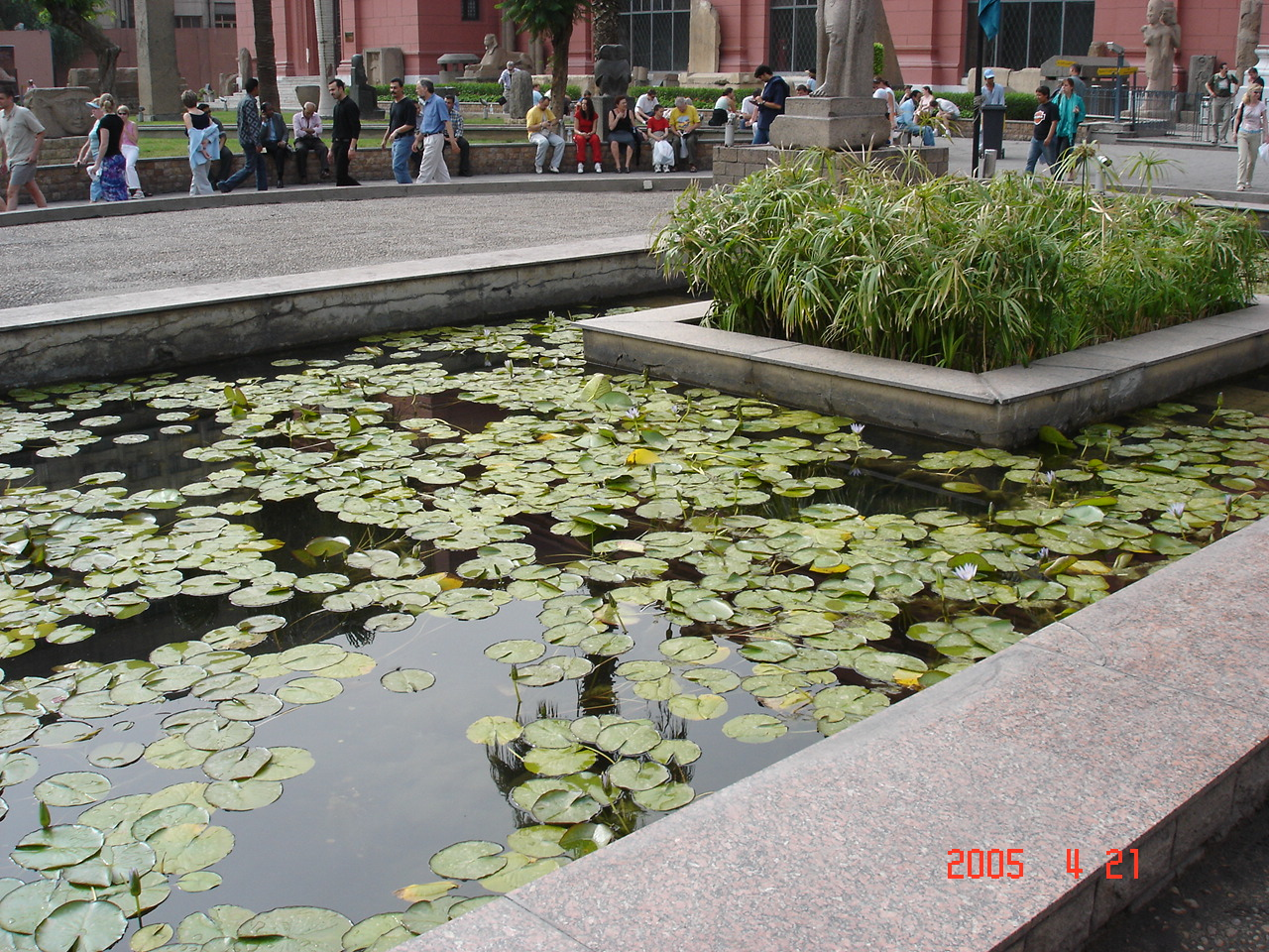 Papirusznád és lótusz virág az ókori Egyiptom két szimbóluma (Egyiptom, Kairó, Tahrír tér, Múzeum kert)